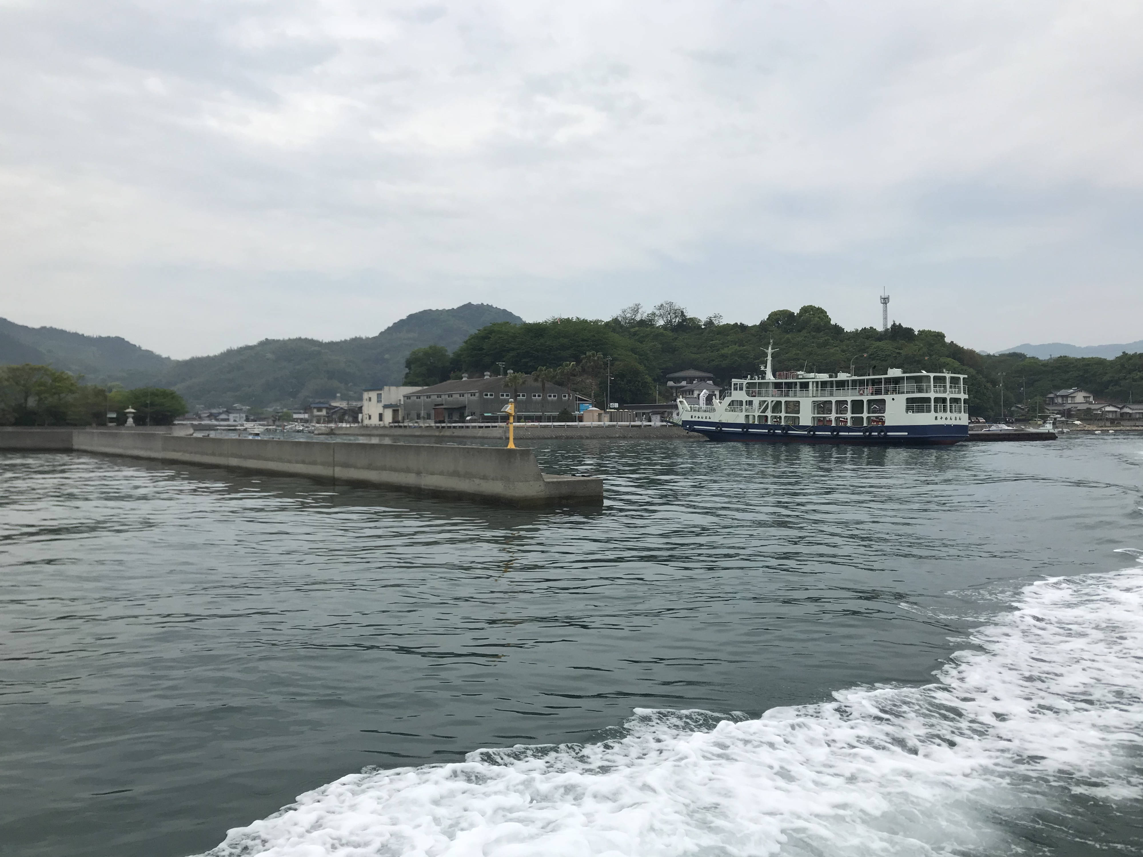 土生港行きの高速船より望む鷺港